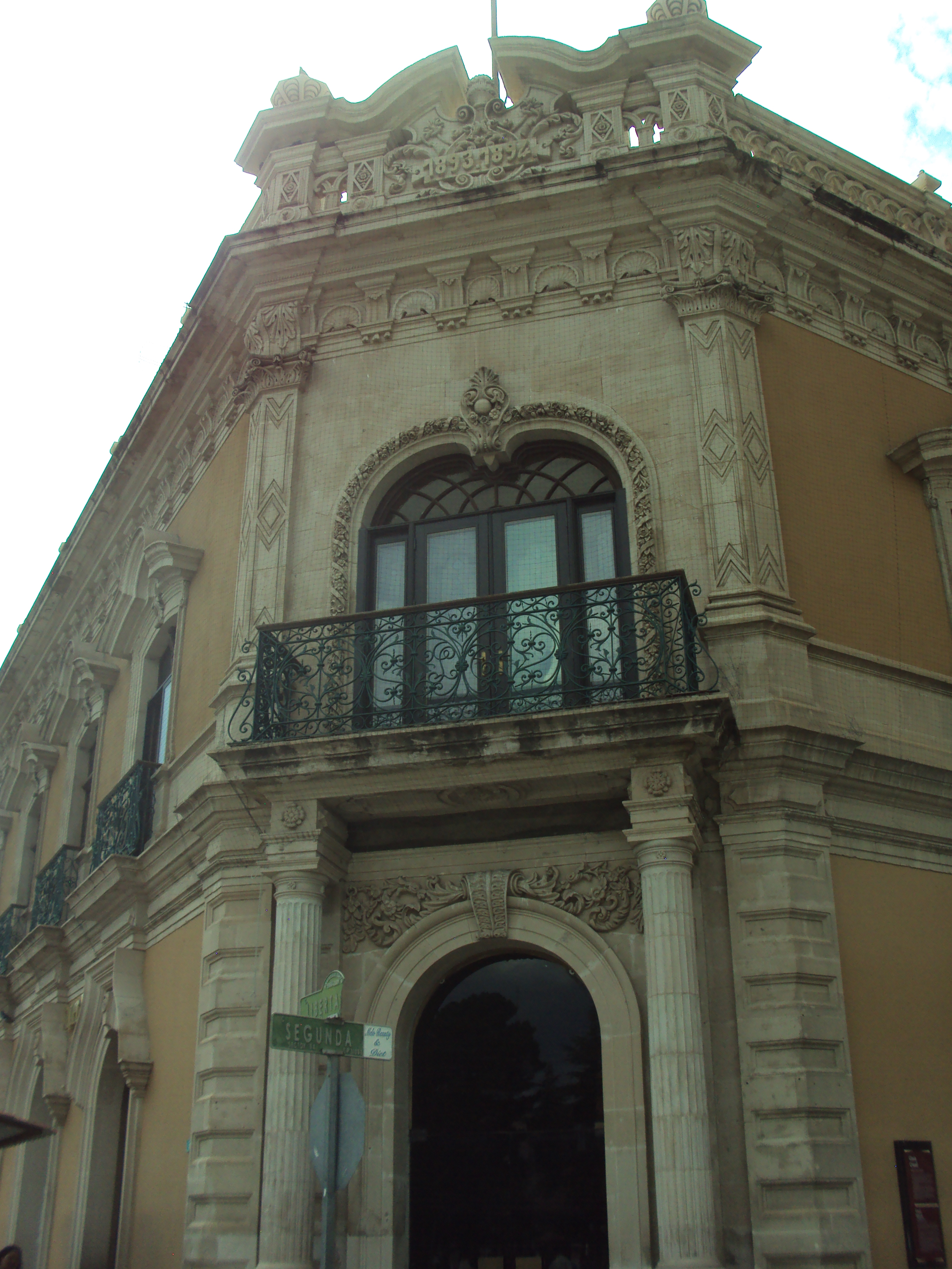 Fachada de la antigua residencia de Enrique C. Creel, en donde hospedo el entonces presidente Porfirio Diaz en 1908